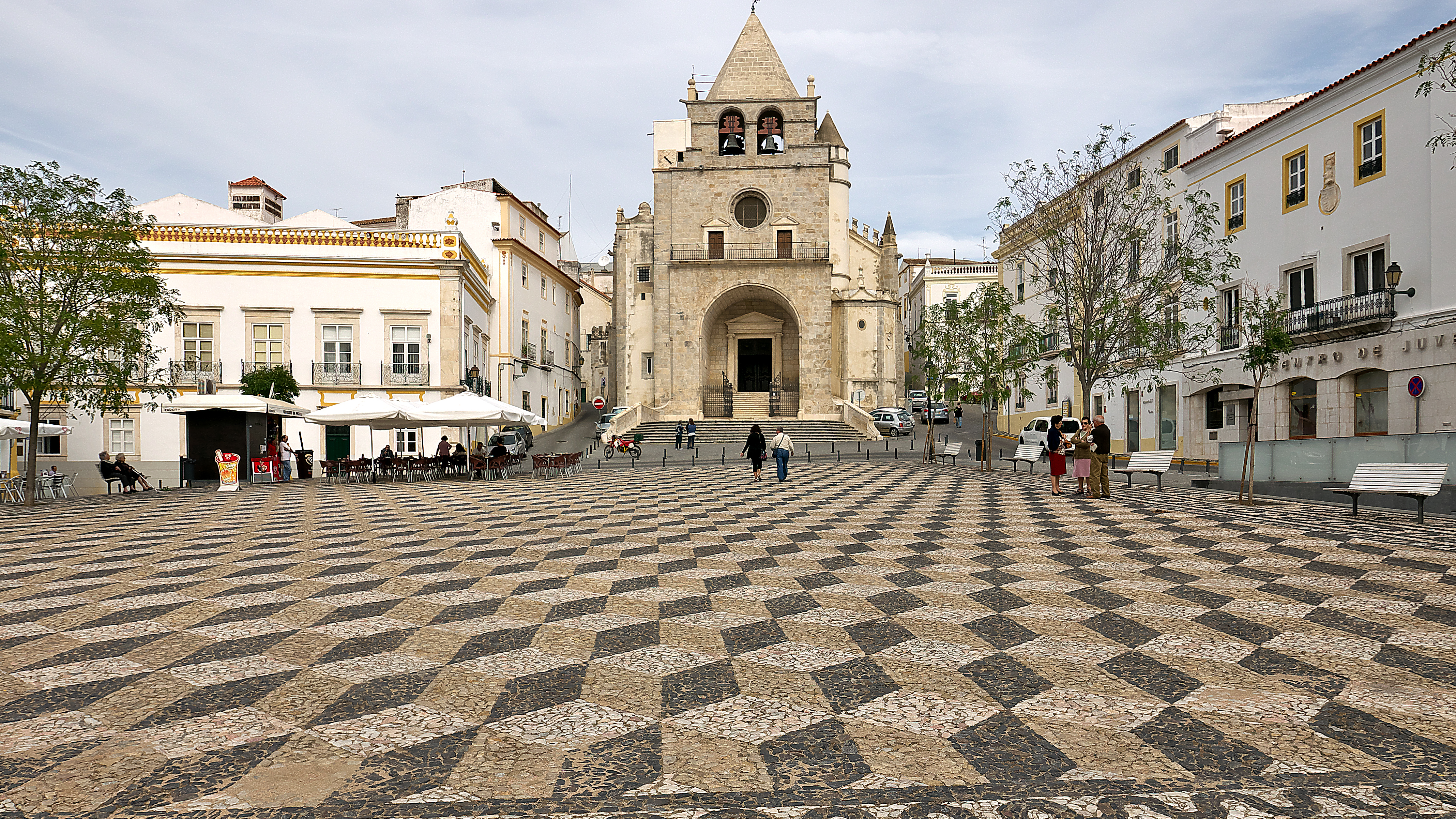 Plaza principal de la ciudad.